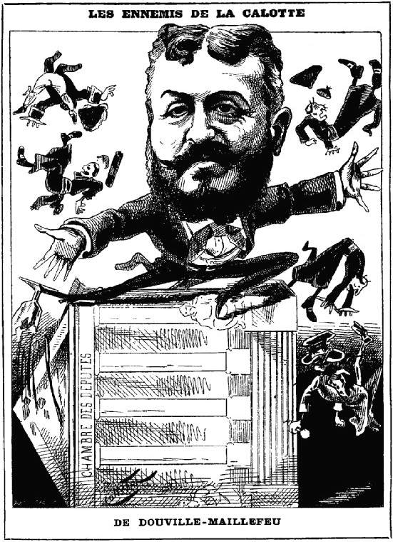 "Les ennemis de la calotte : De Douville-Maillefeu." [Gaston de Douville, chevalier comte de Maillefeu ; Gaston de Douville-Maillefeu]